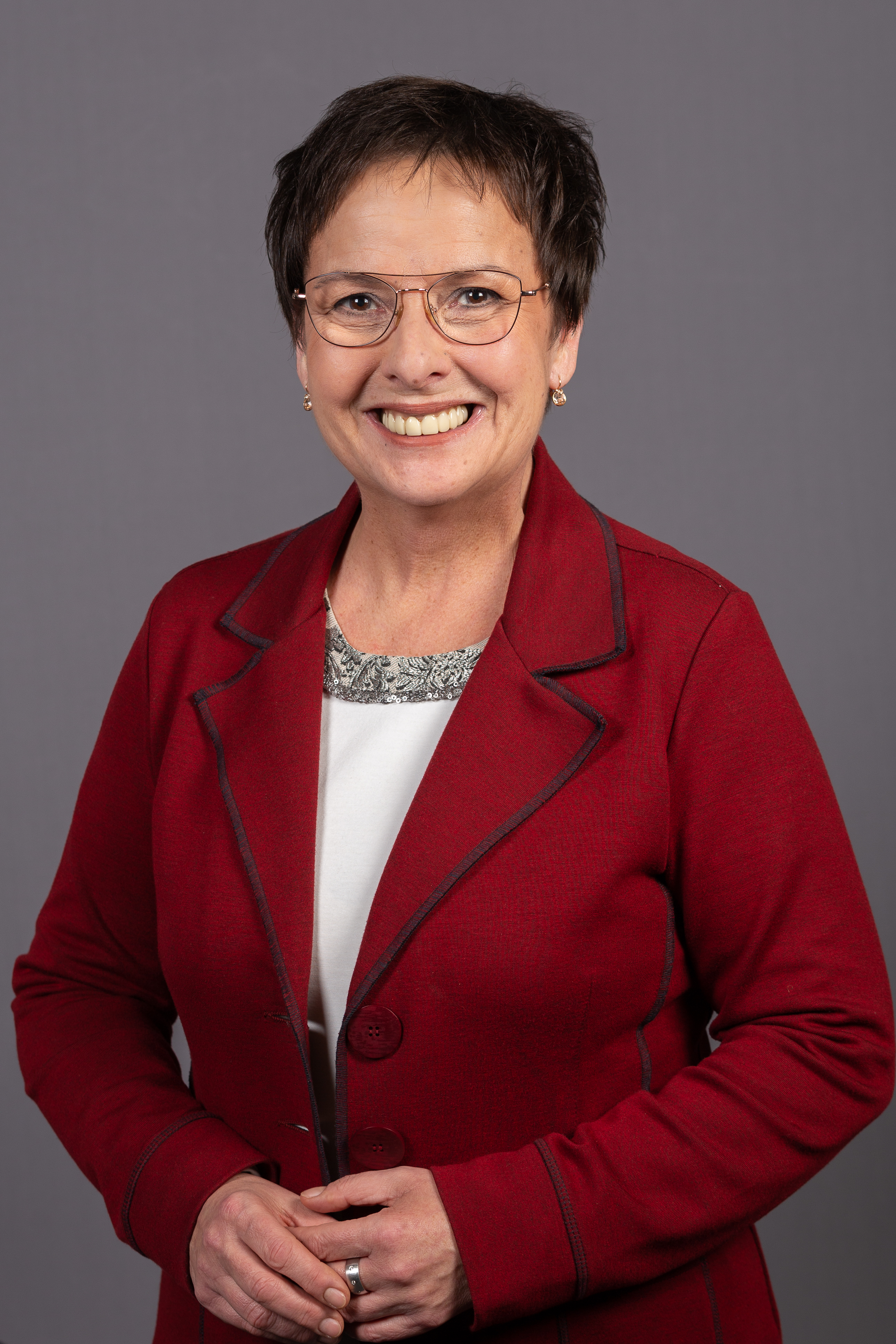 Deutscher Bundestag; Patricia Lips, CDU